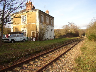 la gare de Berjou (Orne)